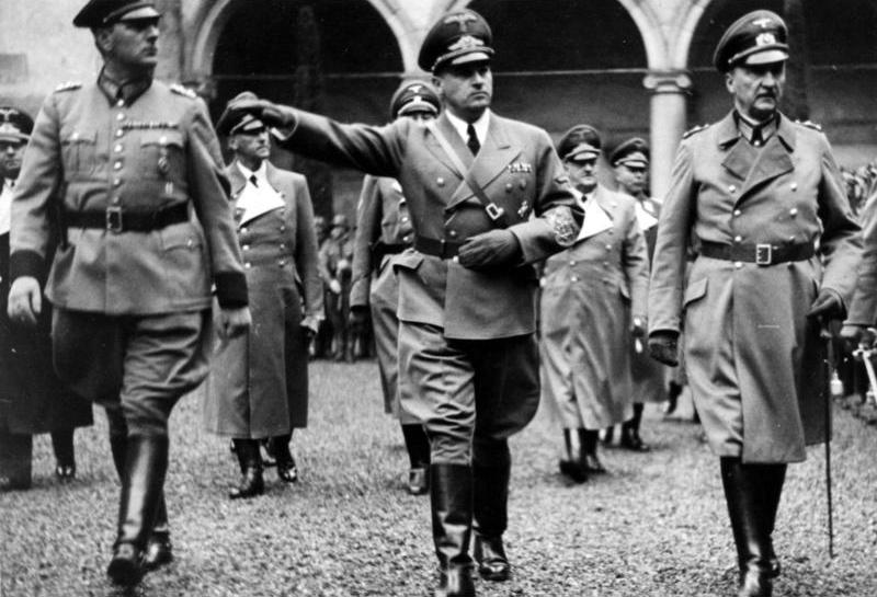 Staatsakt auf der Burg in Krakau [v.links] Gen. Daluege, Dr. Frank, Gen. d. Kavalerie Freiherr v. Gienanth